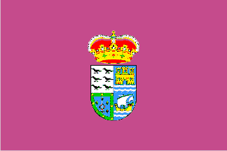 Bandera del concejo asturiano de Soto del Barco